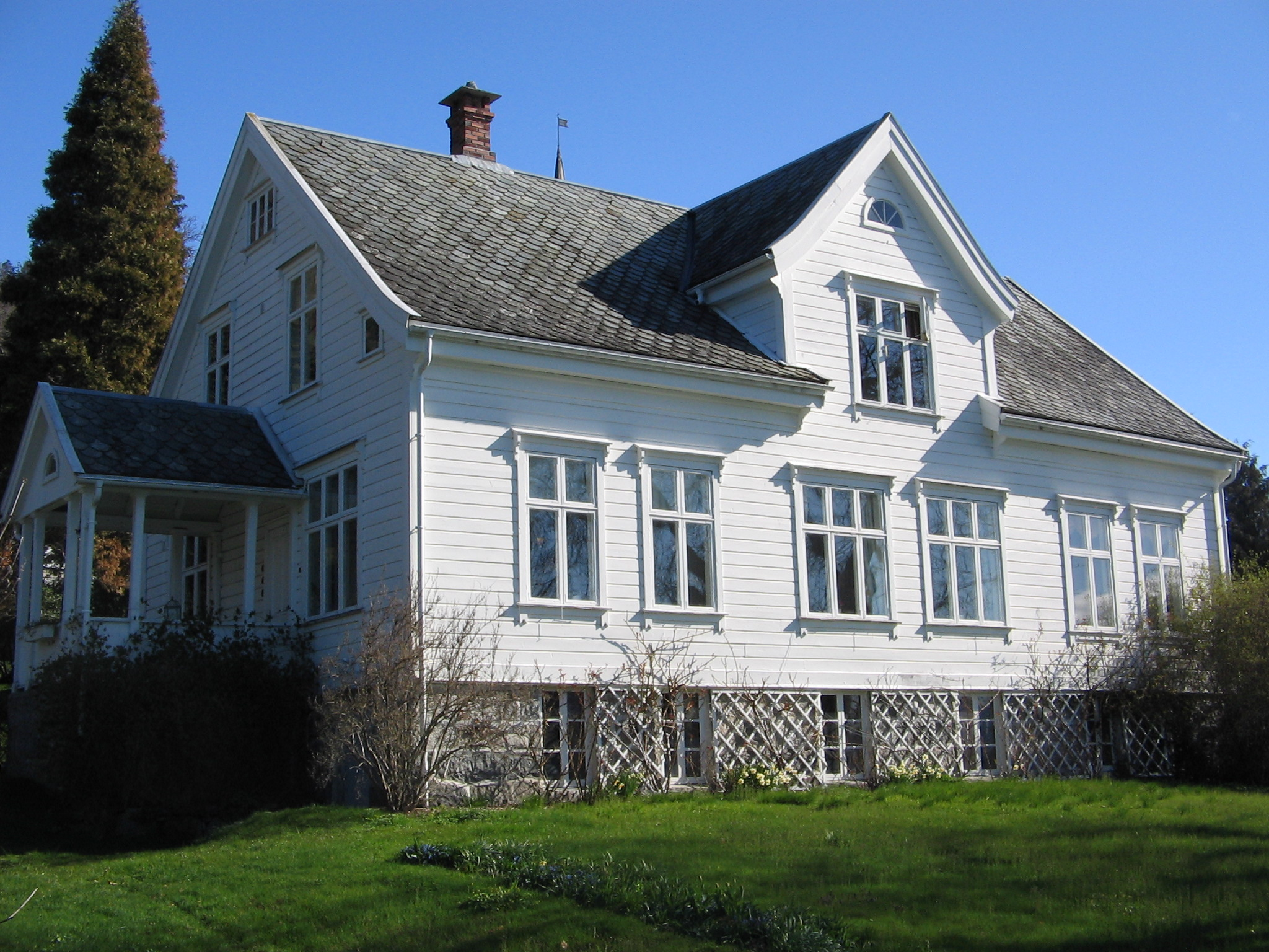 Hovudbygningen på Leikanger prestegard.